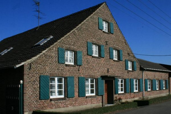 Denkmal Nr. 84 in Schwalmtal-Birgen